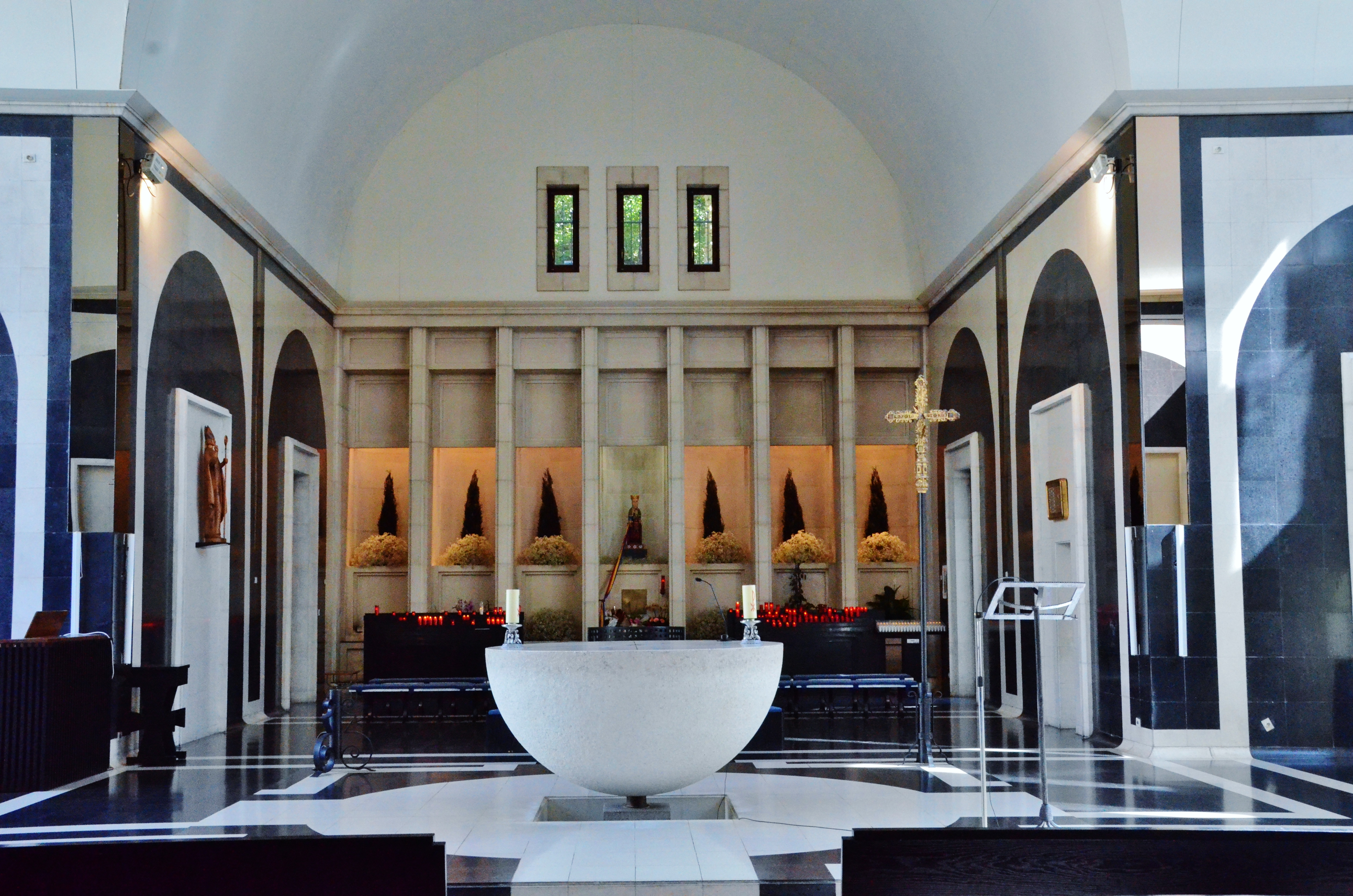 Santuari nou de Meritxell